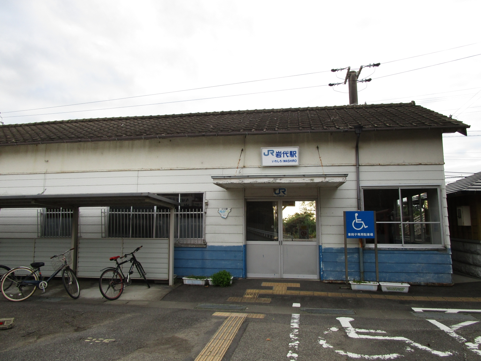 岩代駅駅舎